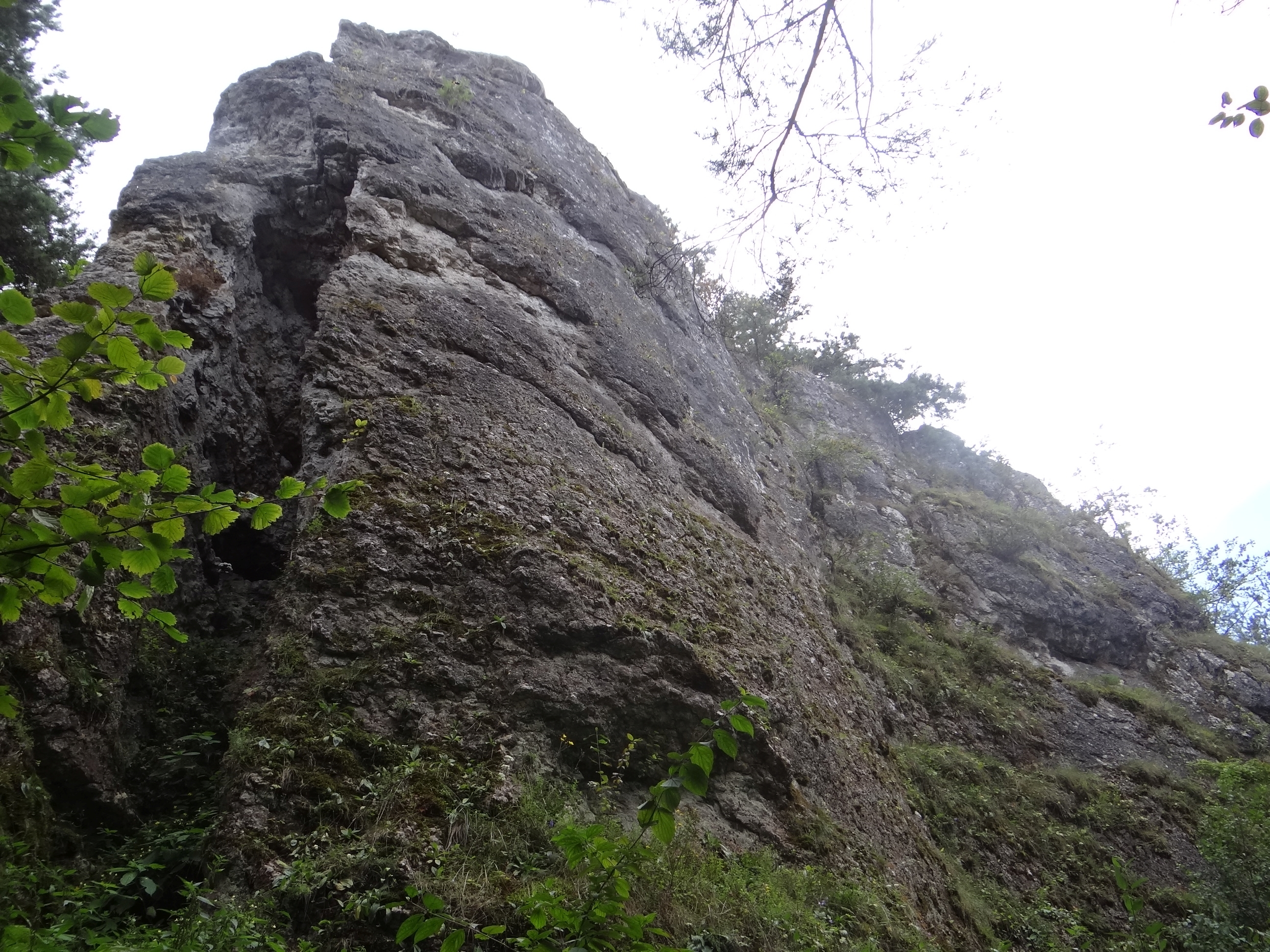 Skała na wzgórzu Dupnica w Ryczowie